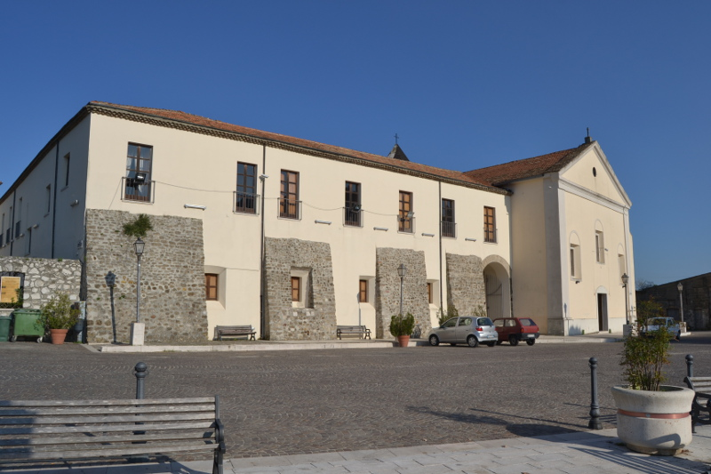 ex convento della SS. Annunziata in Ceppaloni sec. XVI